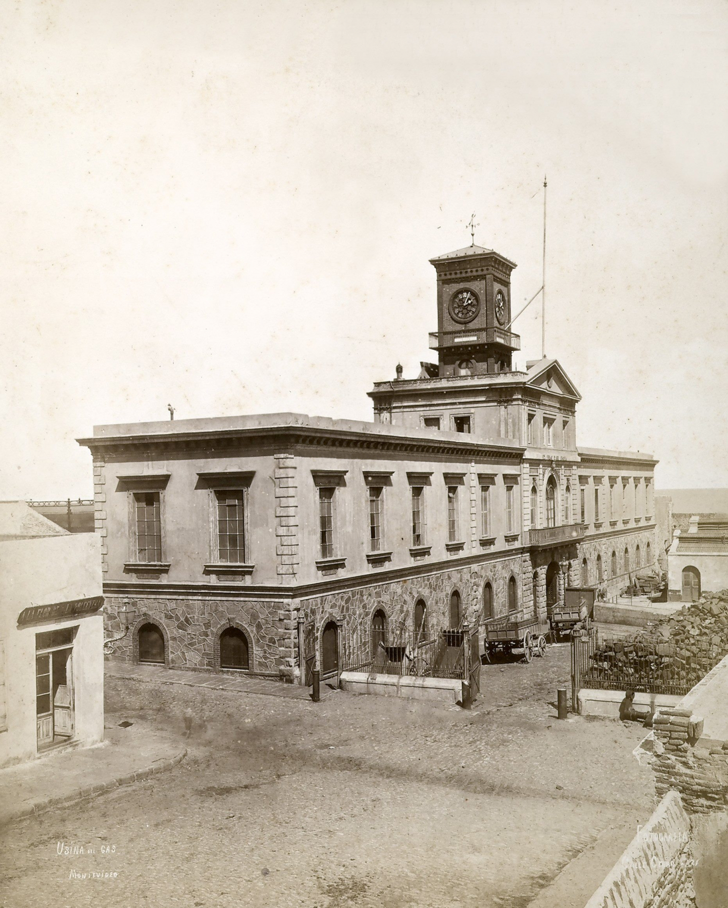 Usina del Gas de Montevideo